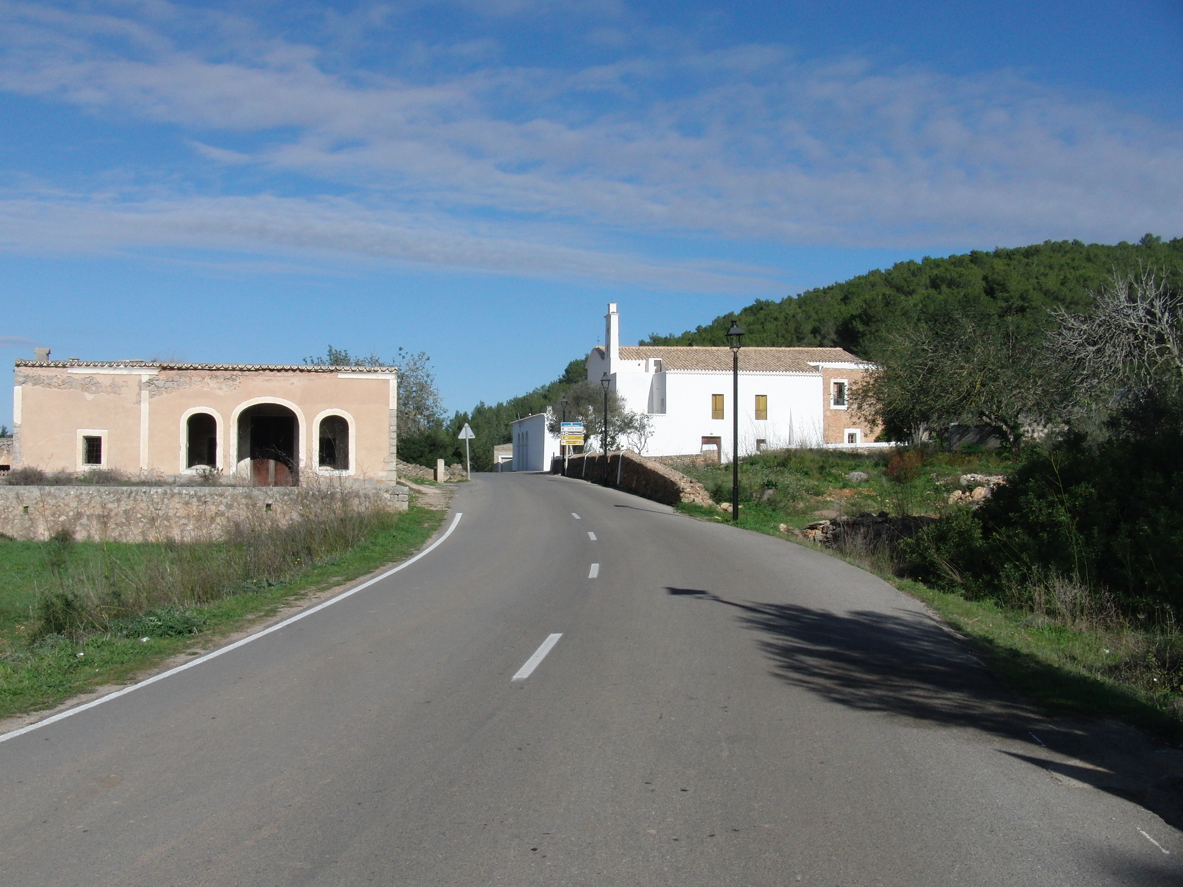 Einfahrt nach San Mateo, Ibiza, Spanien. Rechts die Dorfkirche San Mateo (Sant Mateu d' Albarca)